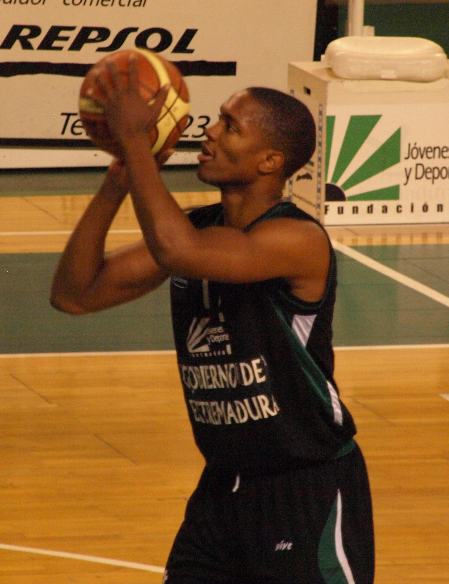 El jugador español de baloncesto Richard Nguema en un partido con su club, el Cáceres Ciudad del Baloncesto, en enero de 2013